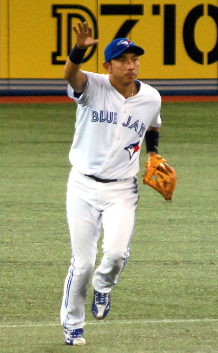 Munenori Kawasaki